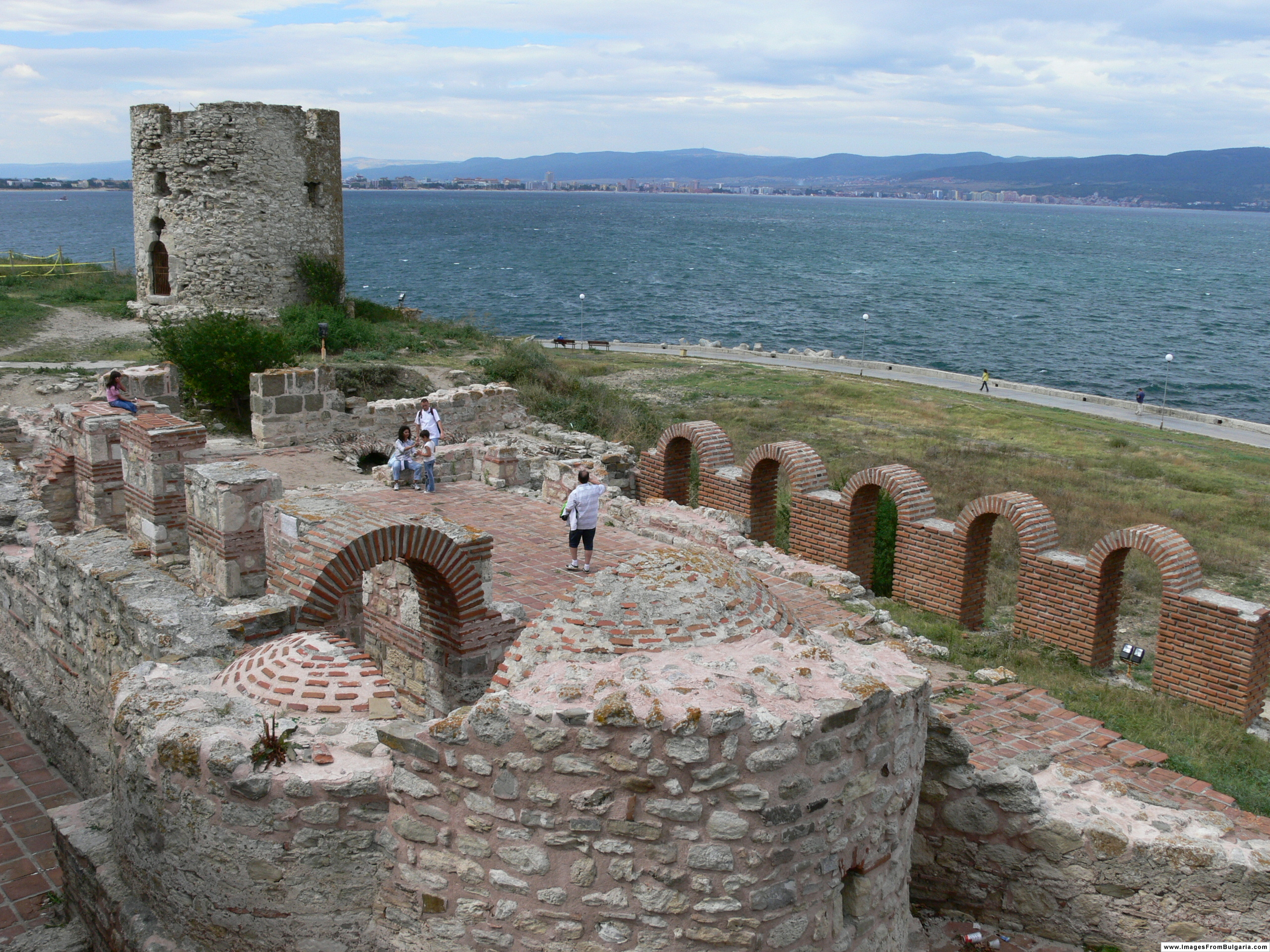 Nesebar, Bulgaria